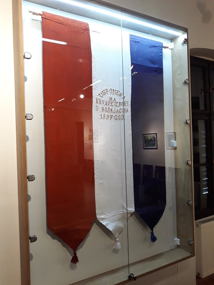 Izvorna trobojnica korištena tijekom Krvavih izbora u Bošnjacima 1897. godine koja se danas čuva u Šumarskome muzeju u Bošnjacima.